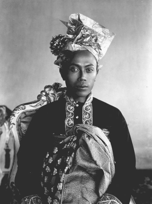 Foto. Portret van Gusti Bagus Djilantik, Stedehouder van Karangasem